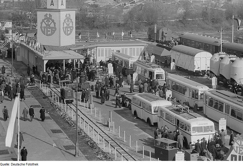 Original image description from the Deutsche Fotothek Blick auf das Ausstellungsgelände der VVB LOWA (Vereinigung volkseigener Betriebe (VVB) des Lokomotiv- und Waggonbaus) auf der Technischen Messe